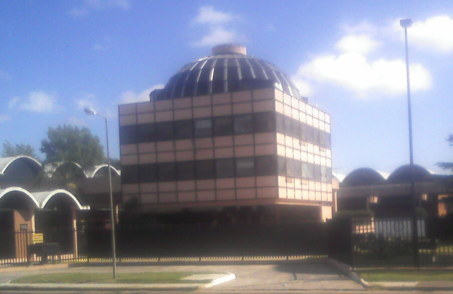 Compañía de Valores Sudamericana (ex Ciccone Calcográfica) en marzo de 2014.